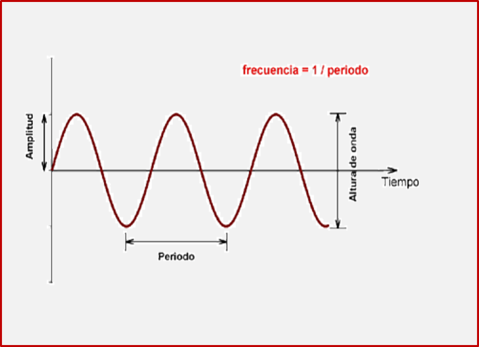 hecho por mi en power point